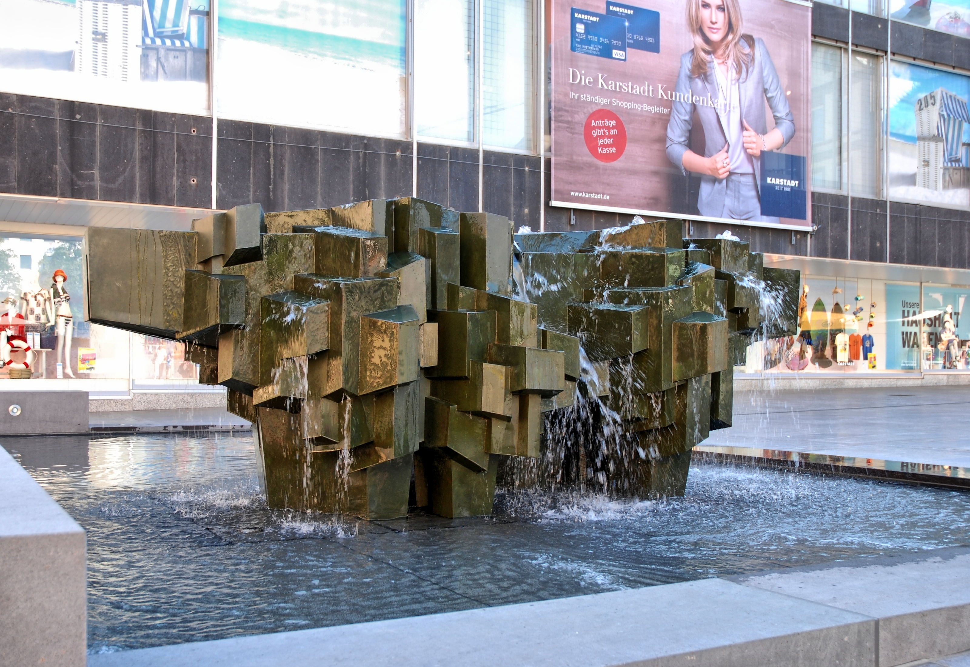 Georg Brenninger: Felsenbrunnen (1963). Bronze, 460 cm breit. Standort: Universitätsplatz Fulda. jpg-Datei "betont" mit easyHDR